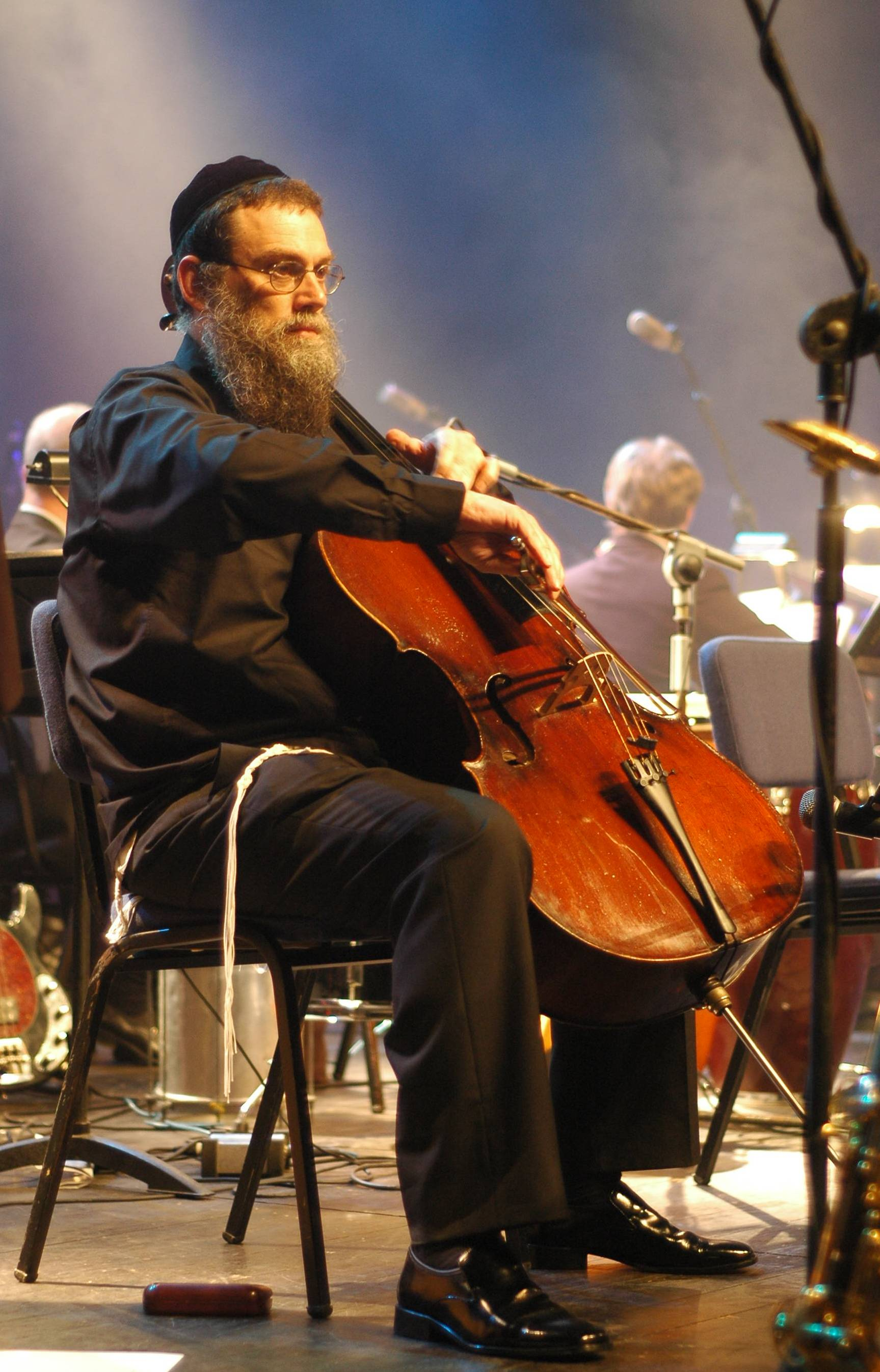 דורון טויסטר